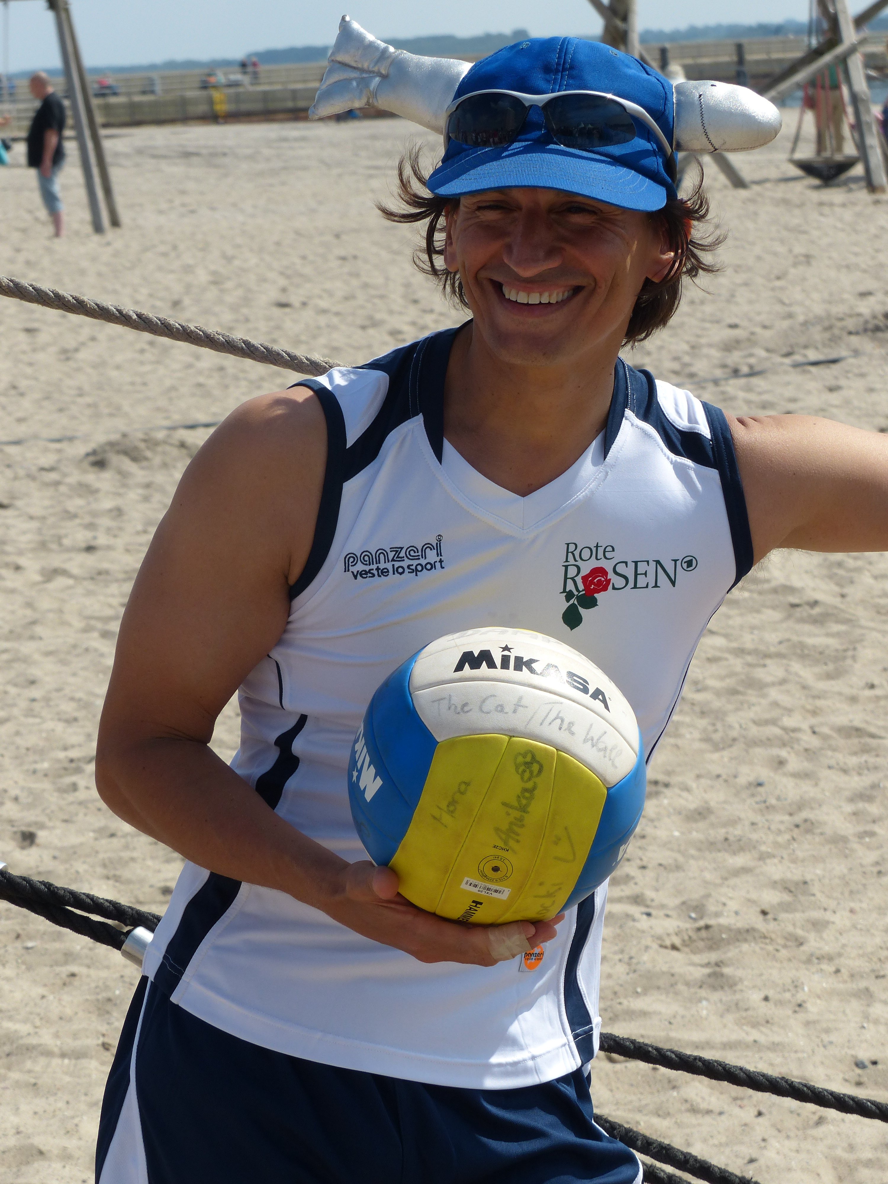 Cuco Wallraff beim Fotoshooting zum Beachvolleyball-Starcup 2013